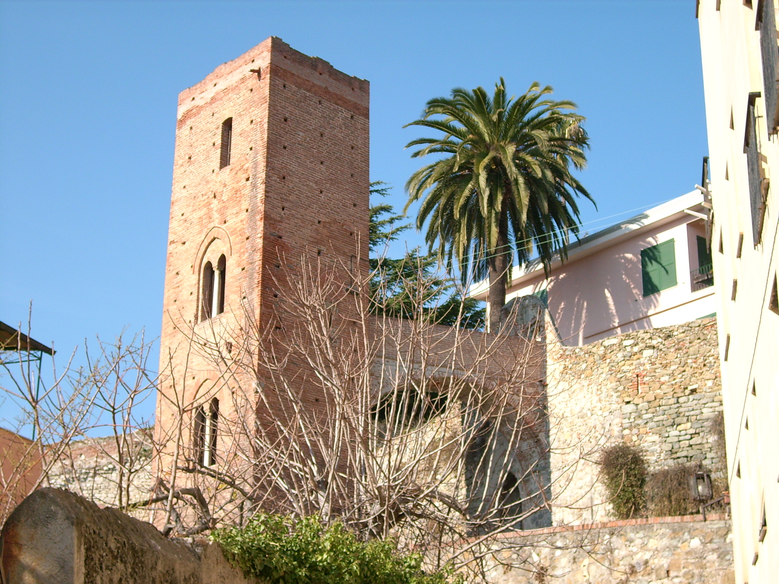 Torre di Noli, Liguria, Italy